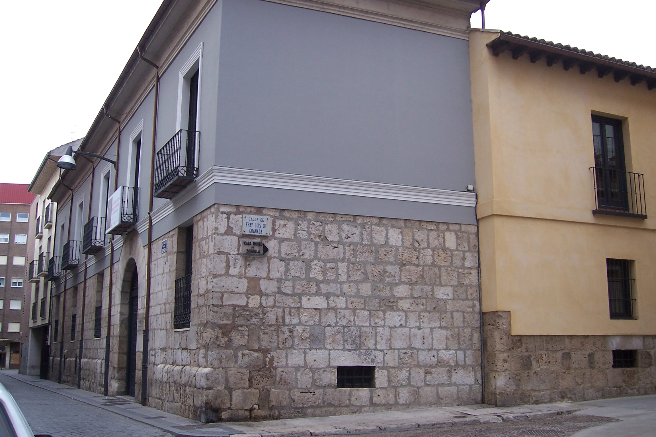 Casa Revilla en la calle de Torrecilla, Valladolid, España.